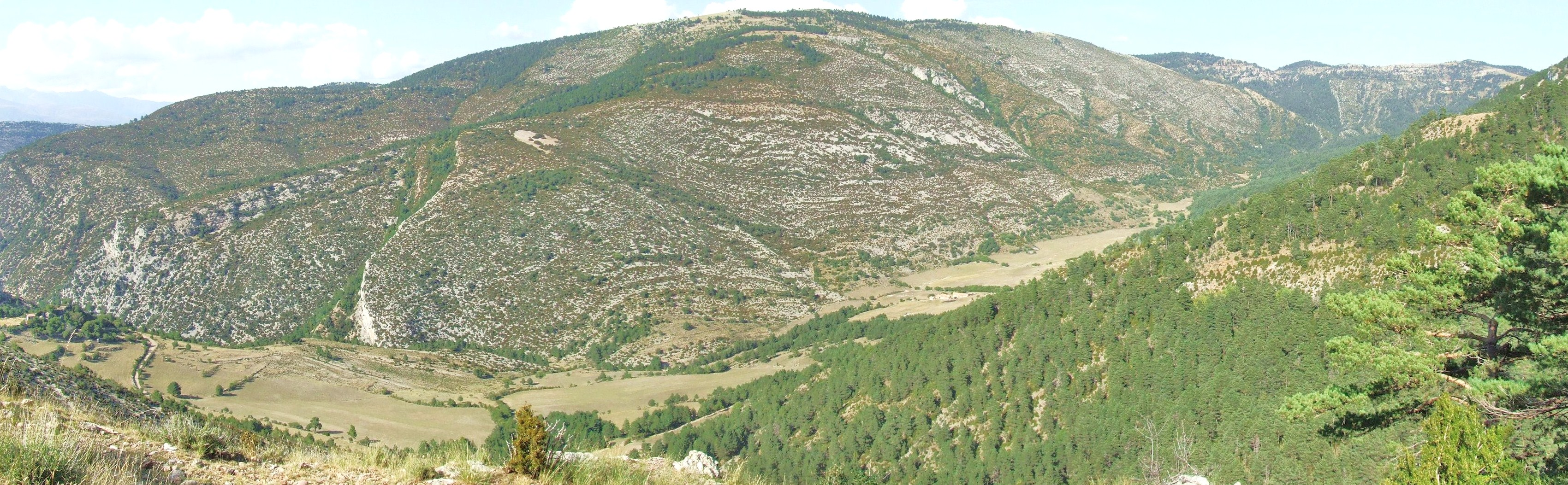 La Coma d'Orient (Hortoneda de la Conca, Conca de Dalt, Pallars Jussà)